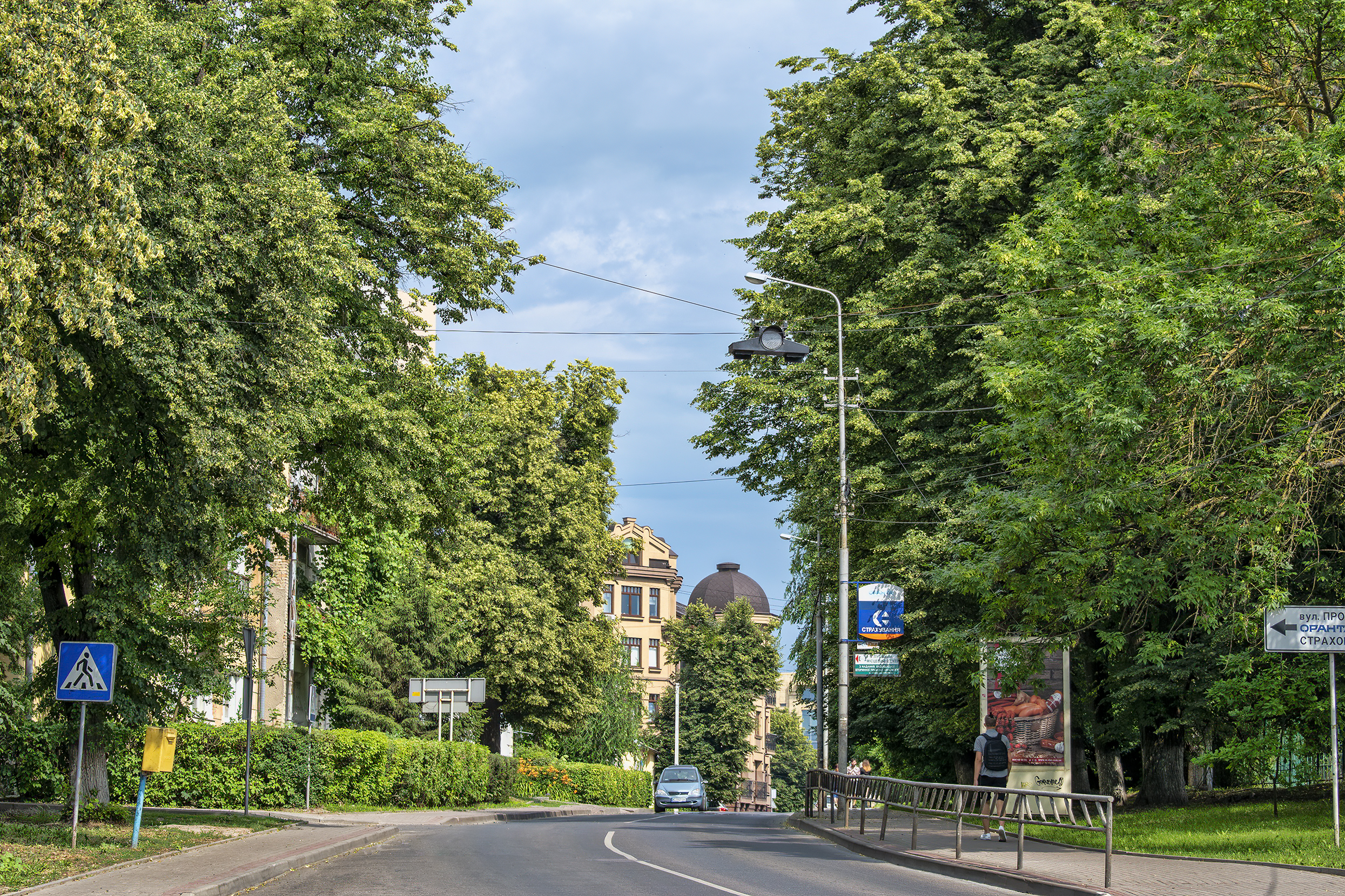 Вулиця Шевченка, східна частина, Луцьк